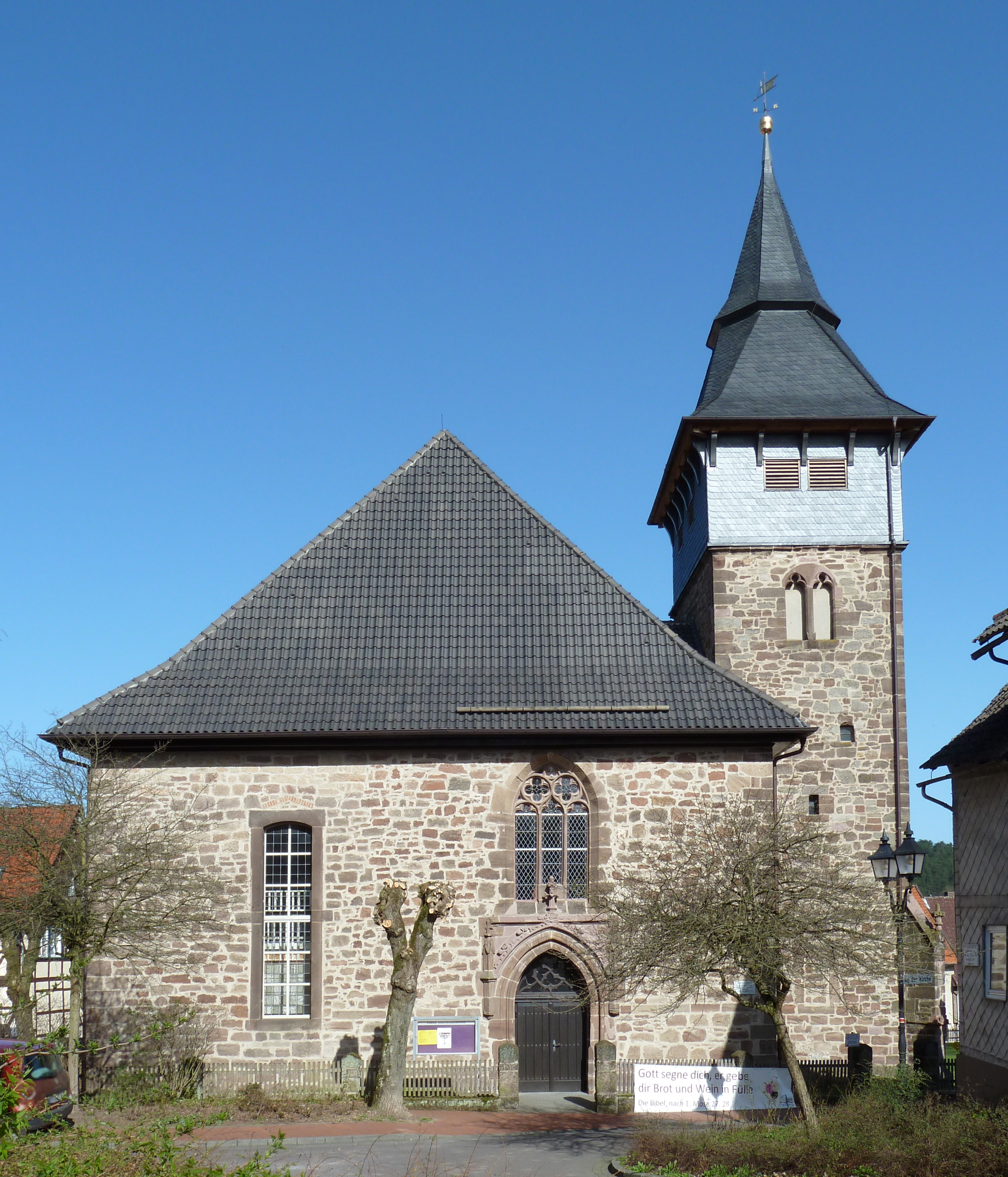 Ev.-luth. Kirche St. Mauritius in Hardegsen, Niedersachsen, Westansicht. Spätgotische Kirche, Schiff größtenteils 1765/89 neu errichtet